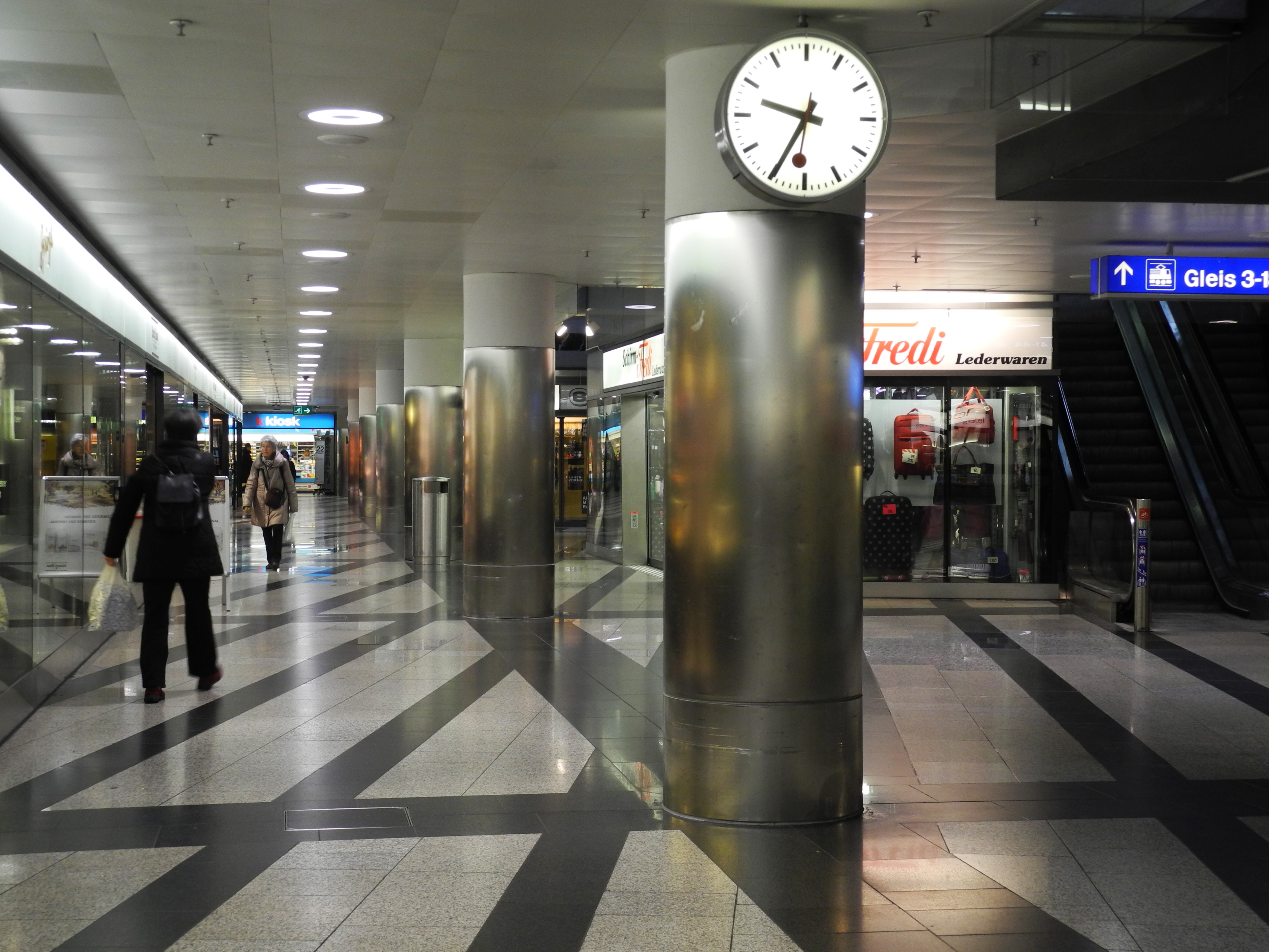 Passage mit Chromstahl verkleideten Stützen